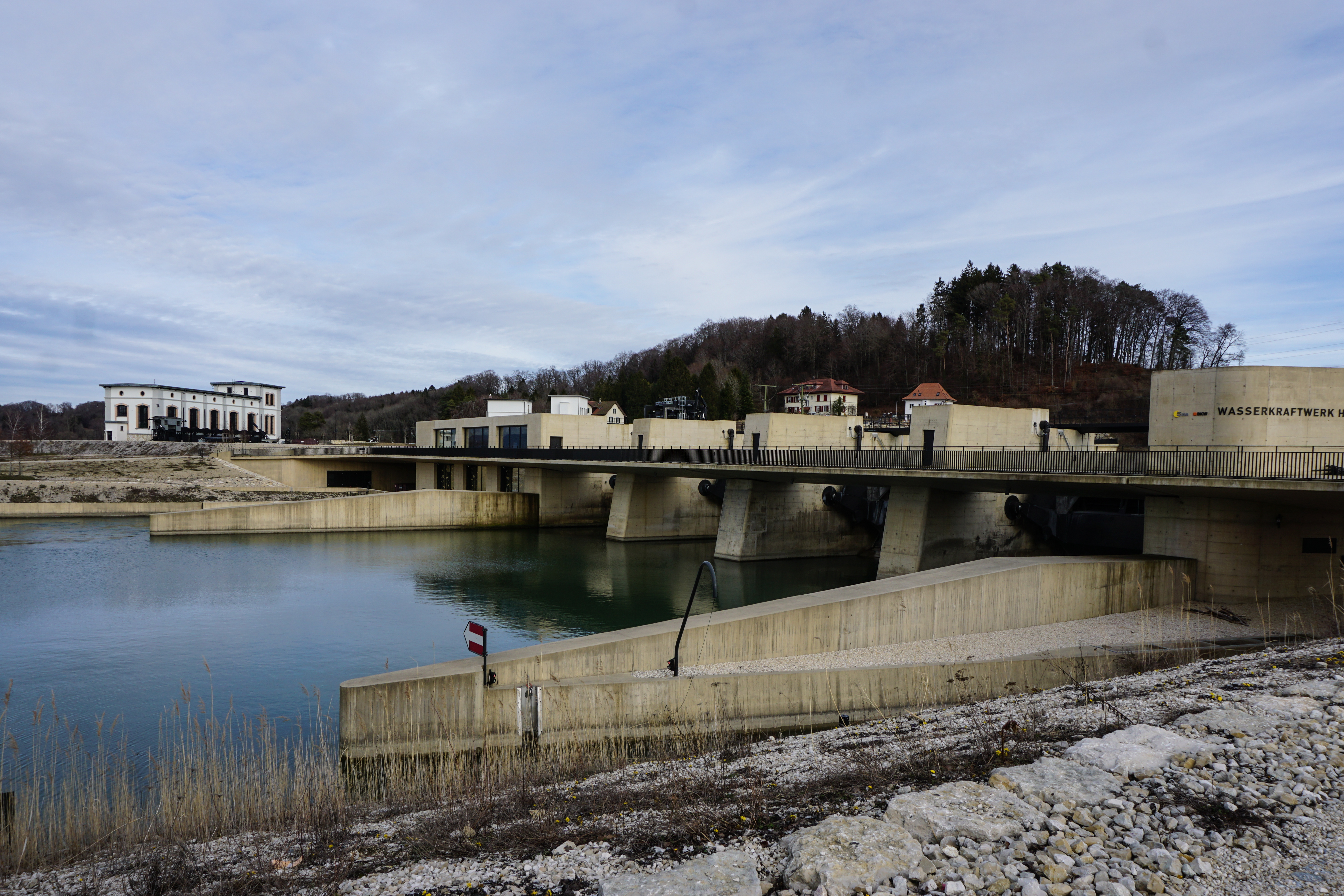 Wasserkraftwerk Hagneck, Wehr unterhalb